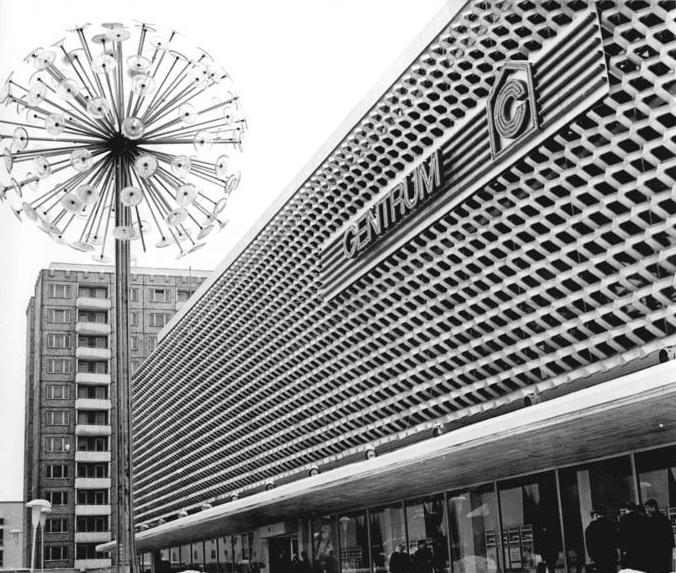 Suhl, "Centrum"-Warenhaus ADN-Zentralbild: Unterwegs im Bezirk Suhl Bildserie J 0316-01-1-7 "Die örtlichen Organe haben schrittweise moderne Versorgungs- und Betreuungssysteme zu schaffen, die mit der gesellschaftlichen Entwicklung des Territoriums in Übereinstimmung stehen, komplex entwickelt werden und volkswirtschaftlich effektiv sind." (Aus dem Abschnitt V des Beschlußentwurfes des Staatsrates vom 11. Dez. 1969) Für den Bezirk Suhl, in dem auf 3.870 km² rd. 545.000 Einwohner in acht Kreisen leben, arbeiten die staatlichen Organe eine wissenschaftlich exakte Konzeption zur Lösung dieser Aufgabe aus. Danach wird aus den Handelseinrichtungen aller eigentumsformen in den nächsten Jahren ein komplexes Versorgungssystem für den Bezirk geschaffen, das die ständig wachsenden Erwartungen der Bevölkerung erfüllen sollen. Besondre Bedeutung kommt dem 1969 eröffneten Centrum-Warenhaus in der Bezirkshauptstadt zu. Durch Pionier- und Spitzenleistungen in der Handelstätigkeit werden die Mitarbeiter erreichen, daß diese moderne einrichtung des Handels wichtigstes Einkaufszentrum für den Bezirk wir. Zentralbild: D. Demme